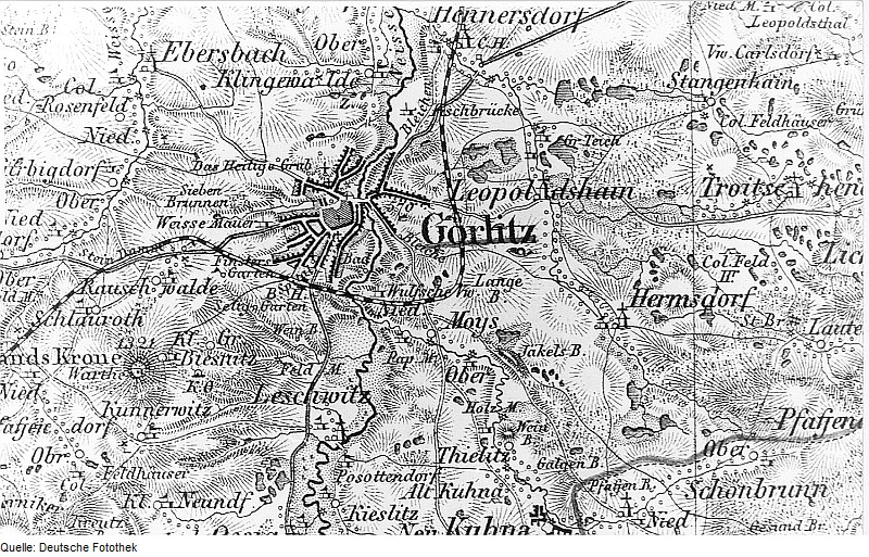 Original image description from the Deutsche Fotothek Görlitz-Weinhübel (bis 1936 Leschwitz). Atlas von Schlesien, Kreis Görlitz, Verlag C. Flemming/Glogau, um 1850